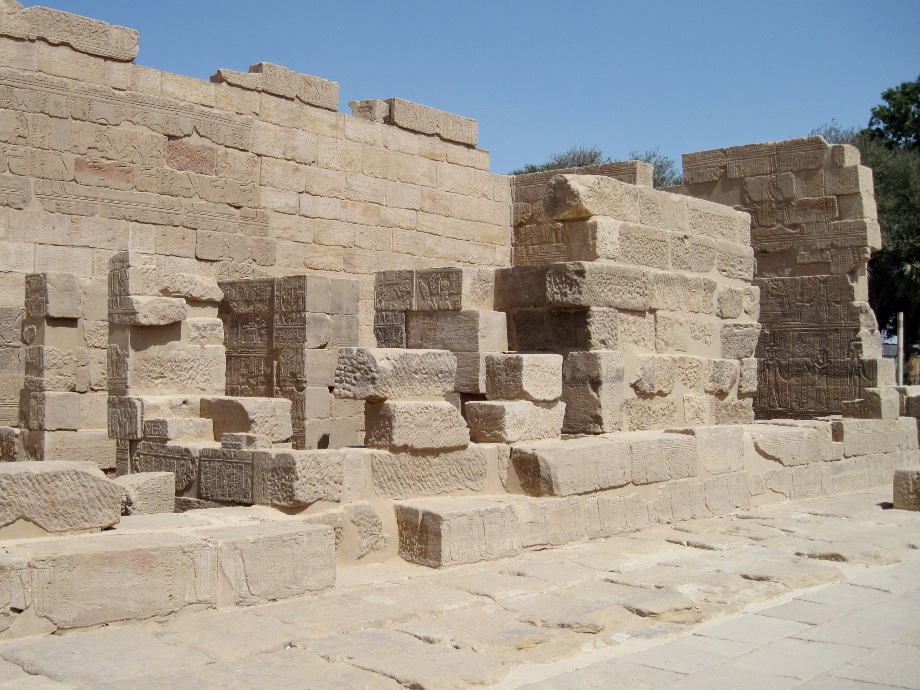 Tempel des Arensnuphis-Dedun, angelegt durch den meroitischen König Arqamani und den Pharao Ptolemaios V., vor dem Isis-Tempel von Philae auf der Insel Agilkia, Ägypten